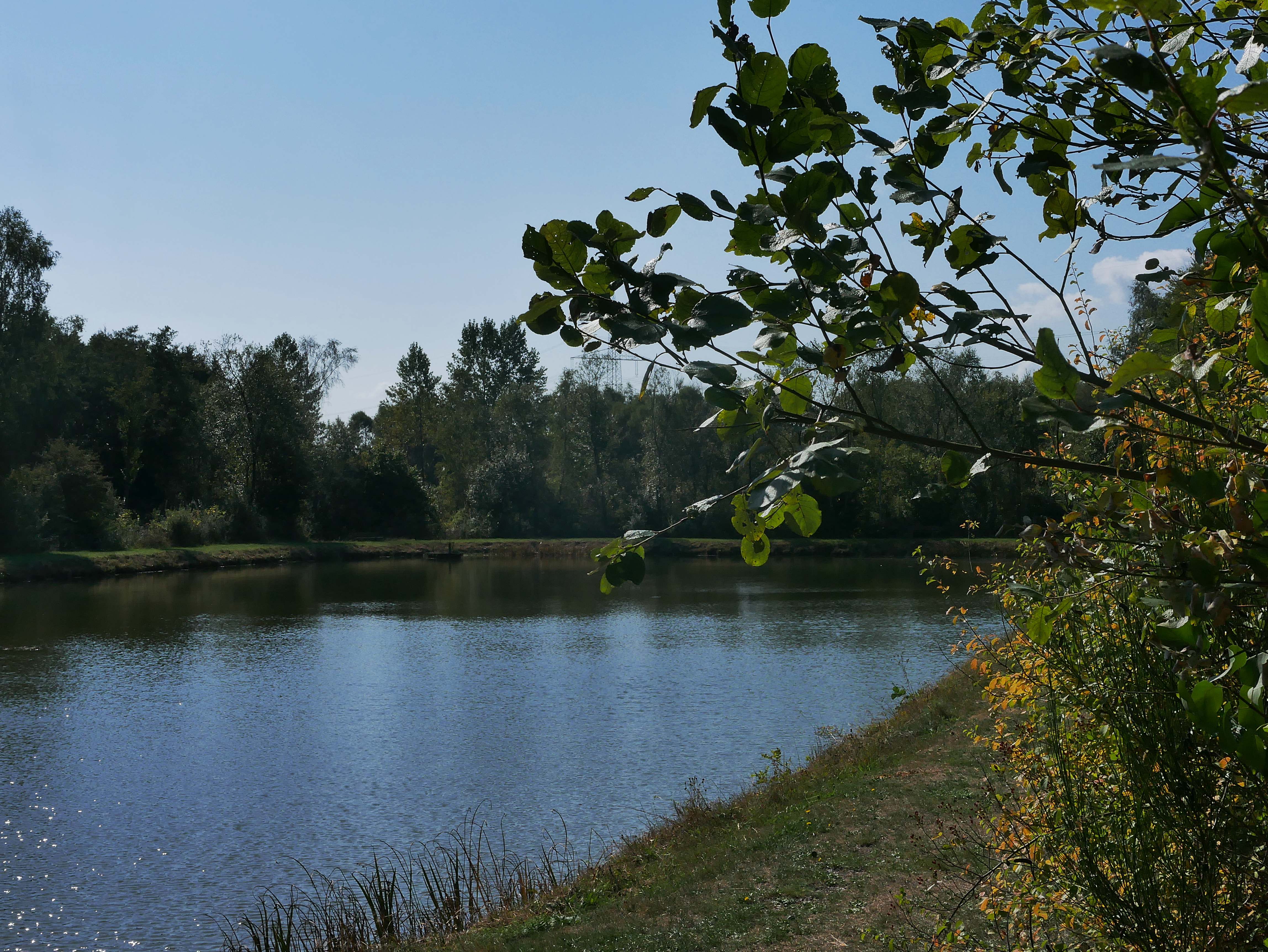 Naturschutzgebiet Eidenbruch bei Gusenburg - See im NO des Gebiets - das Naturschutgebiet beginnt am gegenüberliegenden Ufer des Sees